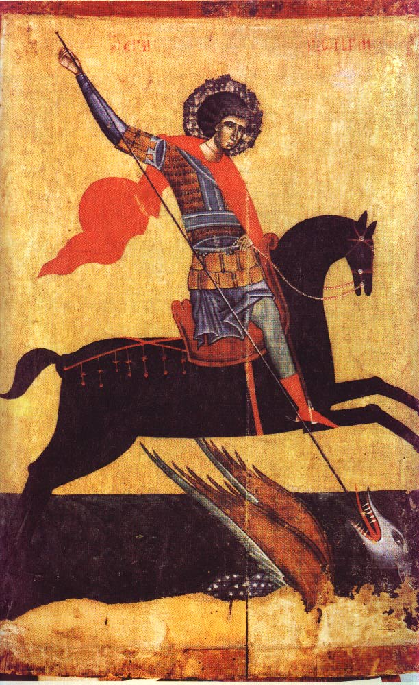 description Saint Georges terrassant le dragon De l'église des saints Joachim et Anne, dans le village de Stanylya, région de Lviv, Musée national de Lviv, Ukraine. licence: domaine public